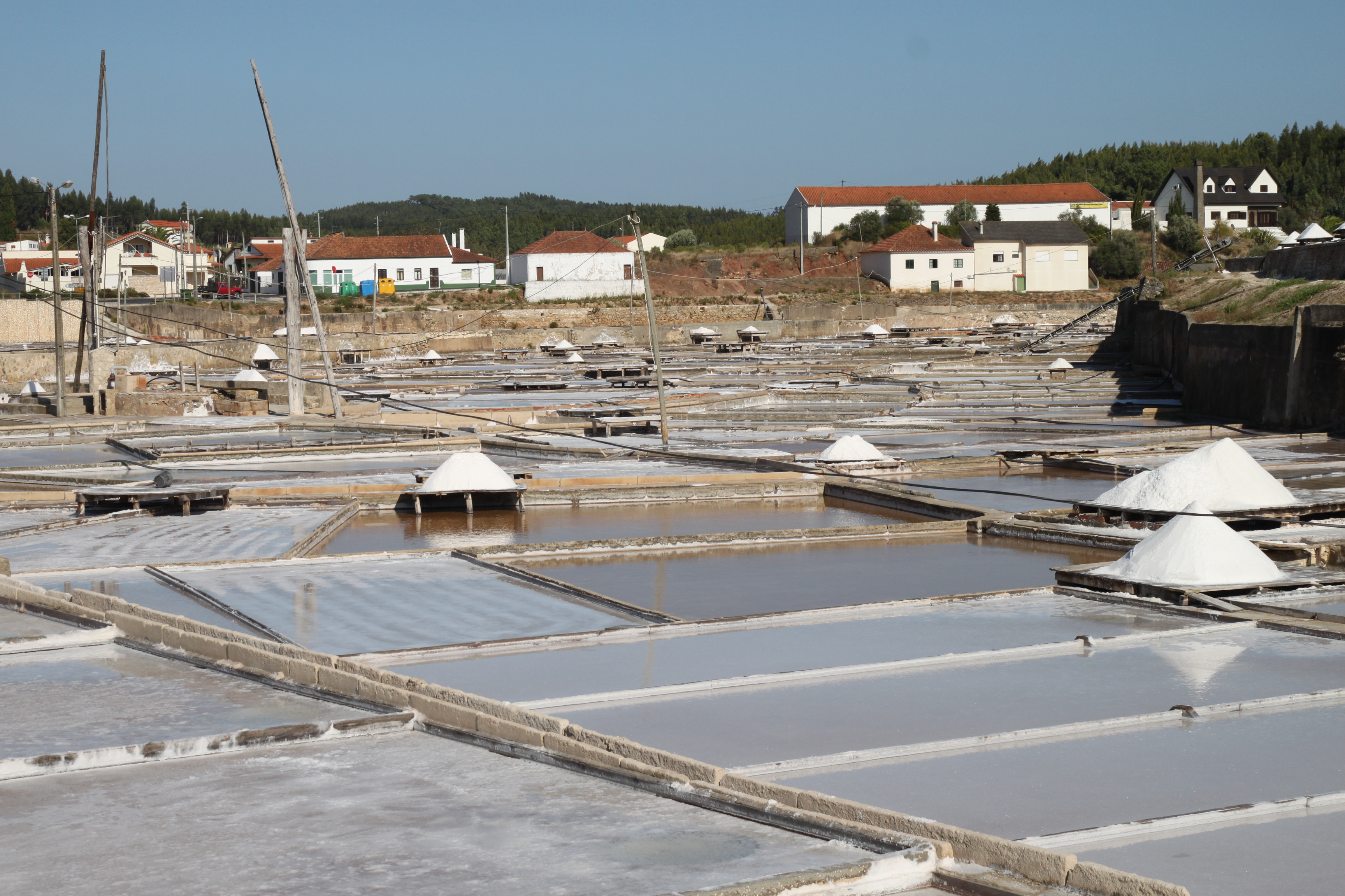 Salinas da Fonte da Bica This file was uploaded for Wiki Loves Monuments in Portugal with the unique identifier 73581.